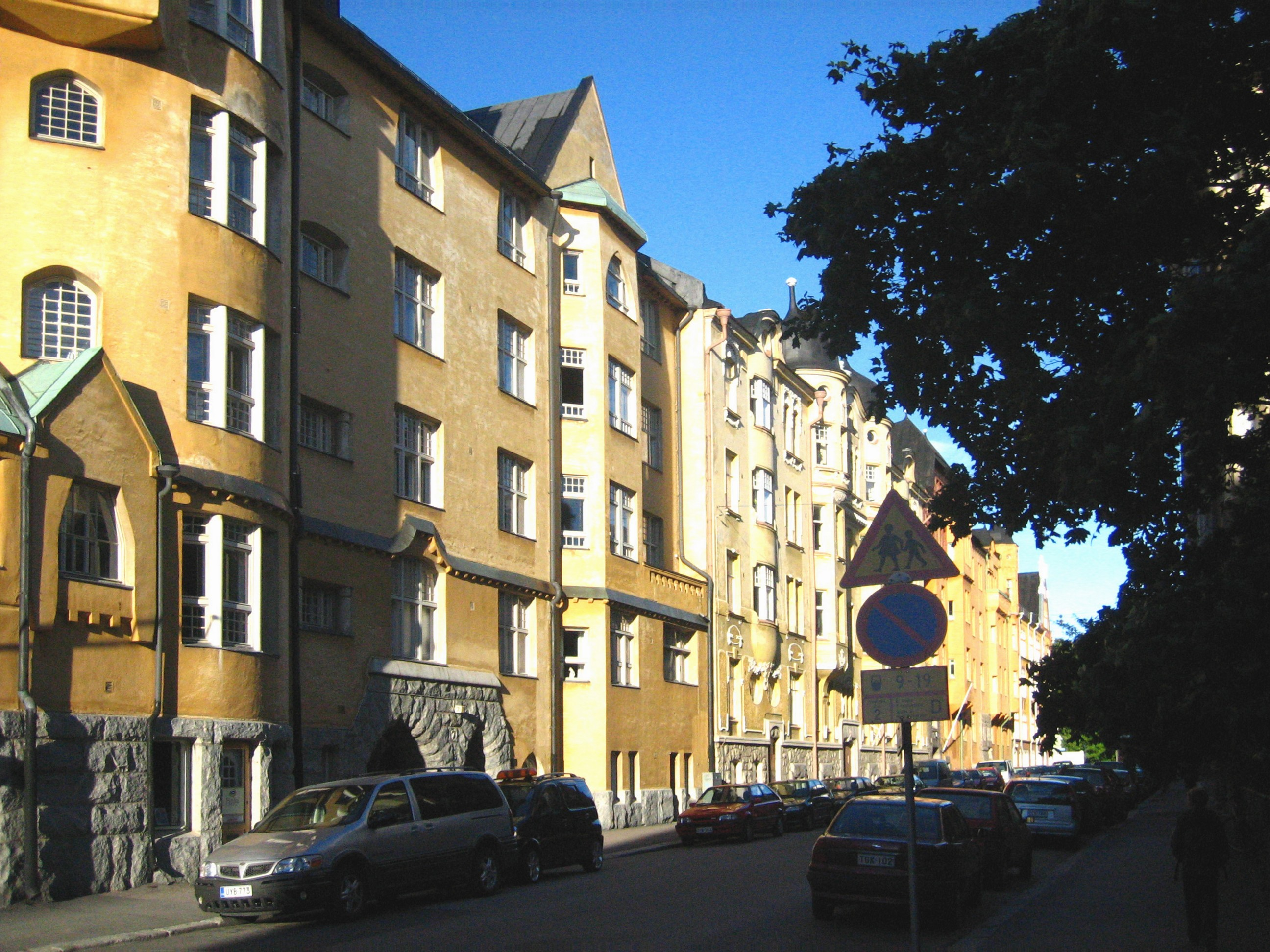 Kauppiaankatu Helsingissä.